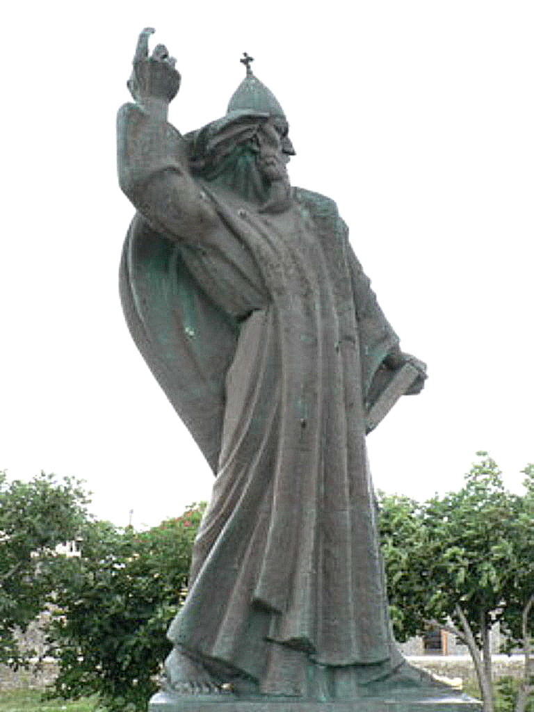 Na obrázku je pomník chorvatského biskupa Grgura Ninského. Nachází se ve městě Nin.